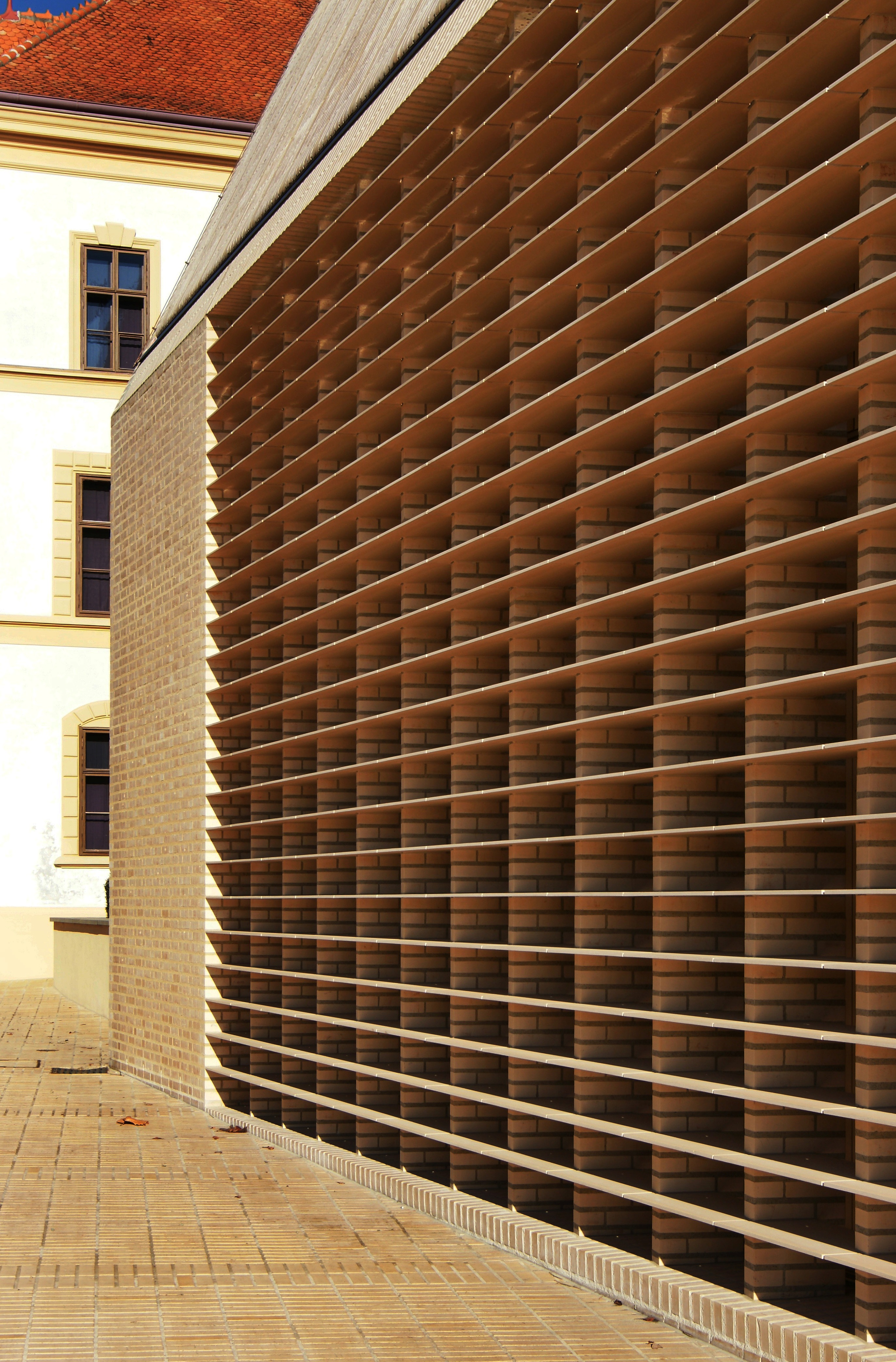 Details: Hohes Haus und Langes Haus des Liechtensteinischen Landtags in Vaduz erbaut 2007. Architekt Hansjörg Göritz.